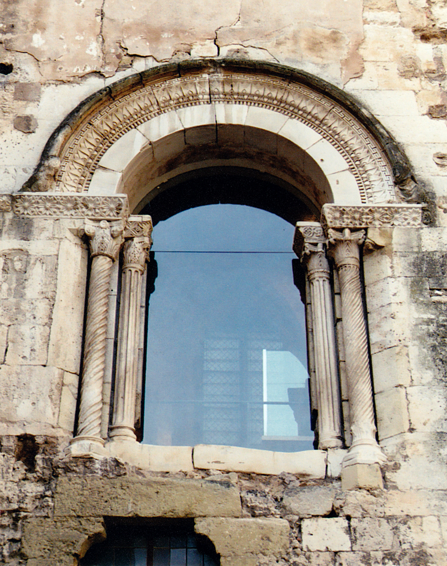 France - Languedoc - Aude - Narbonne - Chapelle de la Madeleine